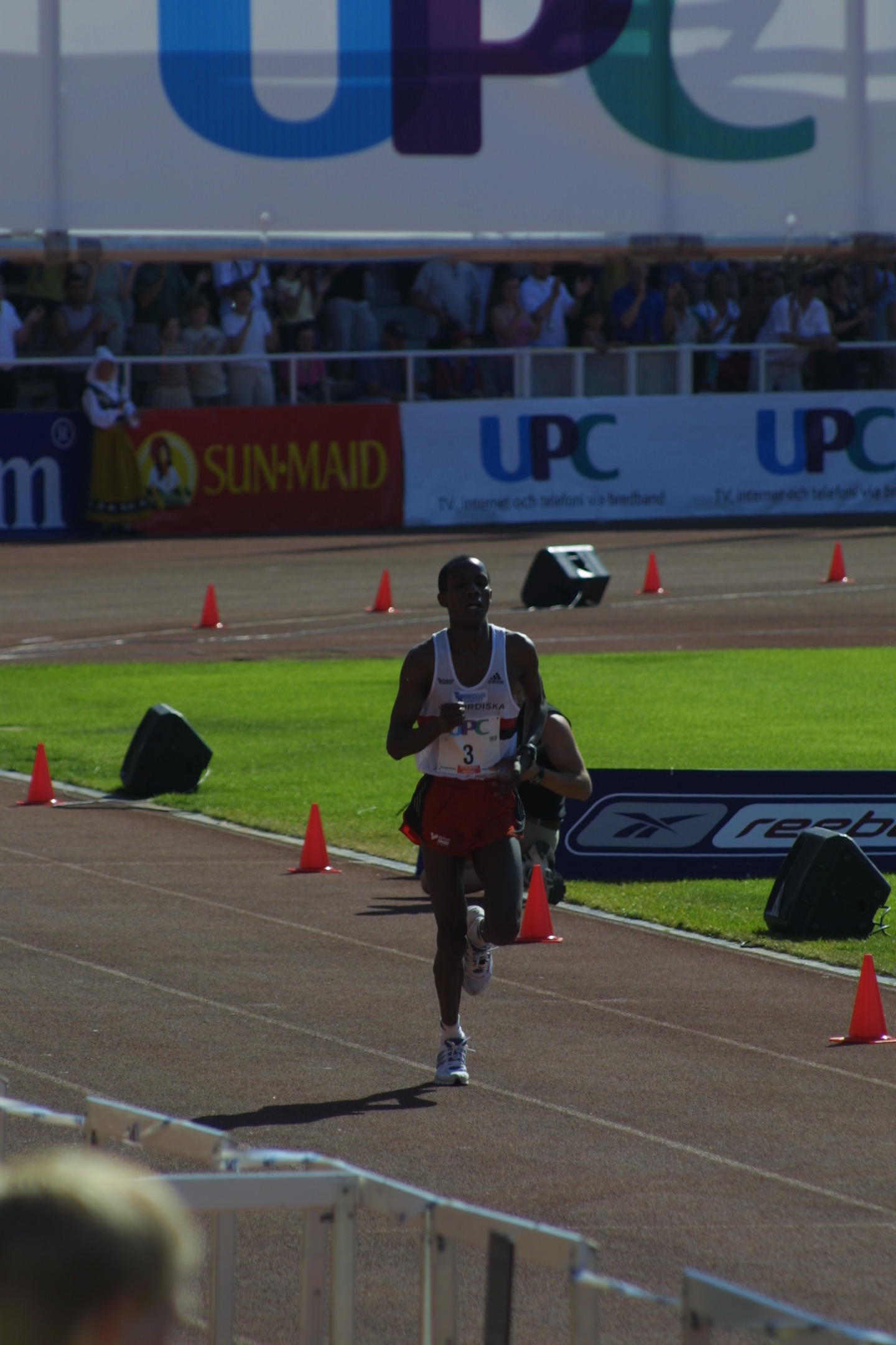 Stockholm Marathon 2002. 2:an Alfred Shemweta, Hässelby SK, Sweden.